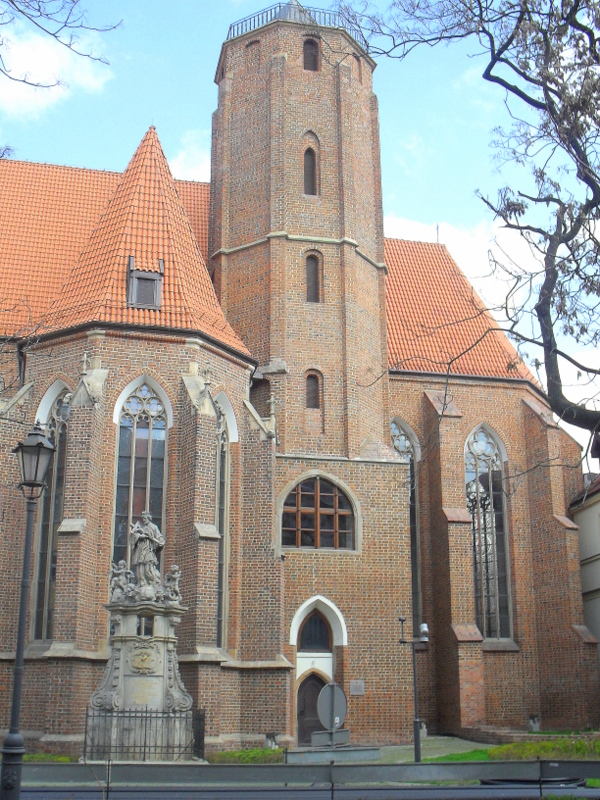 Wrocław, kościół p.w. św. Macieja, pocz. XIII, XIV/XV, 2 poł. XVII